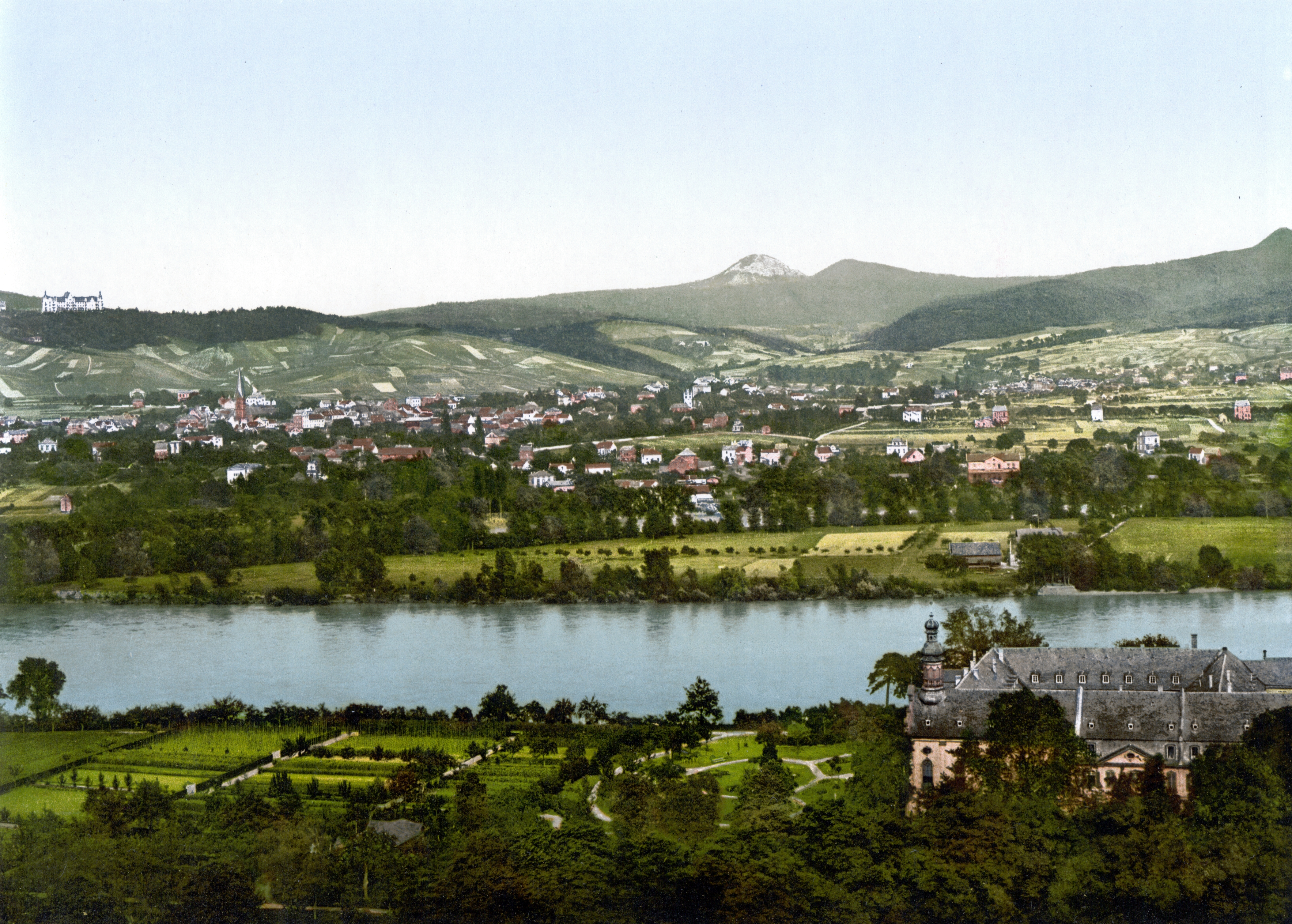 Bad Honnef